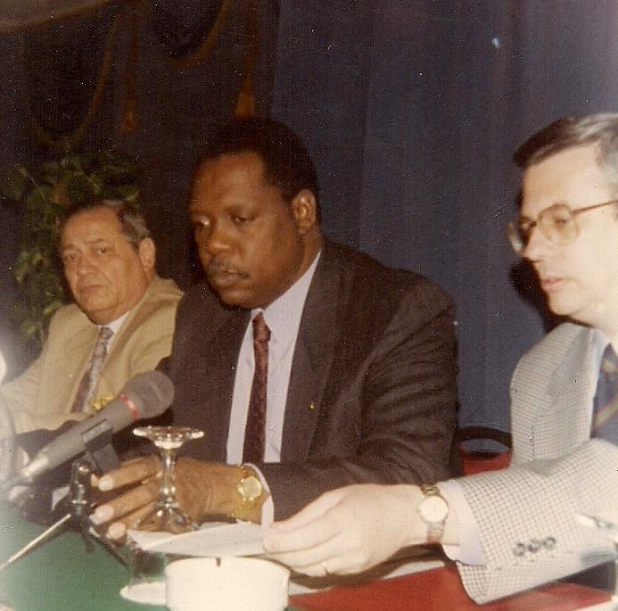 صورة للسيد/عيسي حياتو رئيس الإتحاد الإفريقي لكرة القدم و السيد/مصطفي فهمي المصدر: الصورة ملكية شخصية لي قمت بإلتقاطها بنفسي.